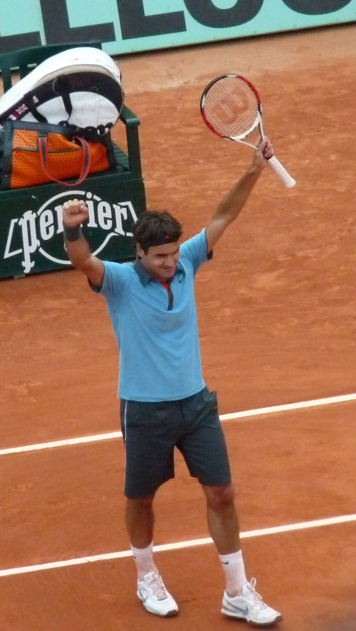 Roger Federer against Juan Martín del Potro in the 2009 French Open semifinals